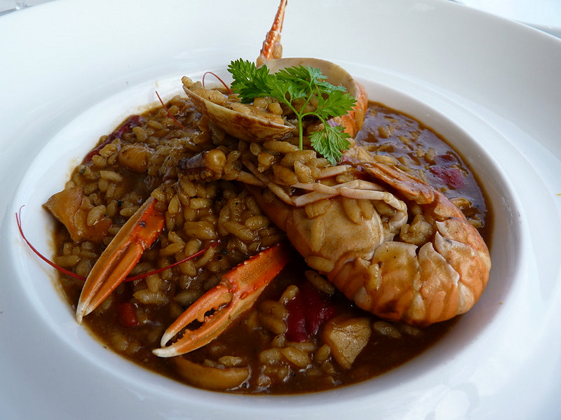 Arròs a la cassola amb escamarlans